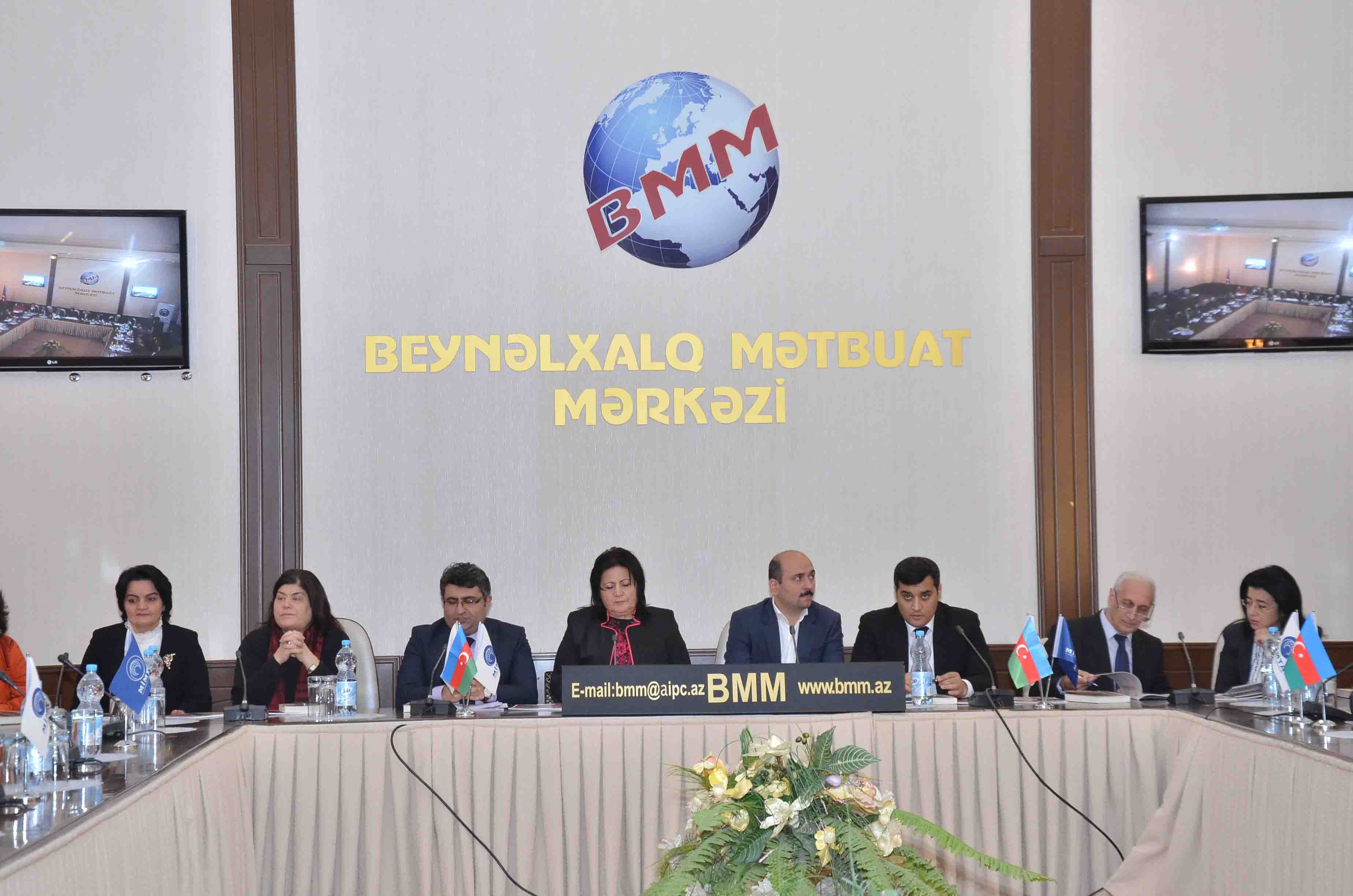 “Azərbaycan Elm və İrfan sərdarları” kitabının geniş təqdimat mərasimi